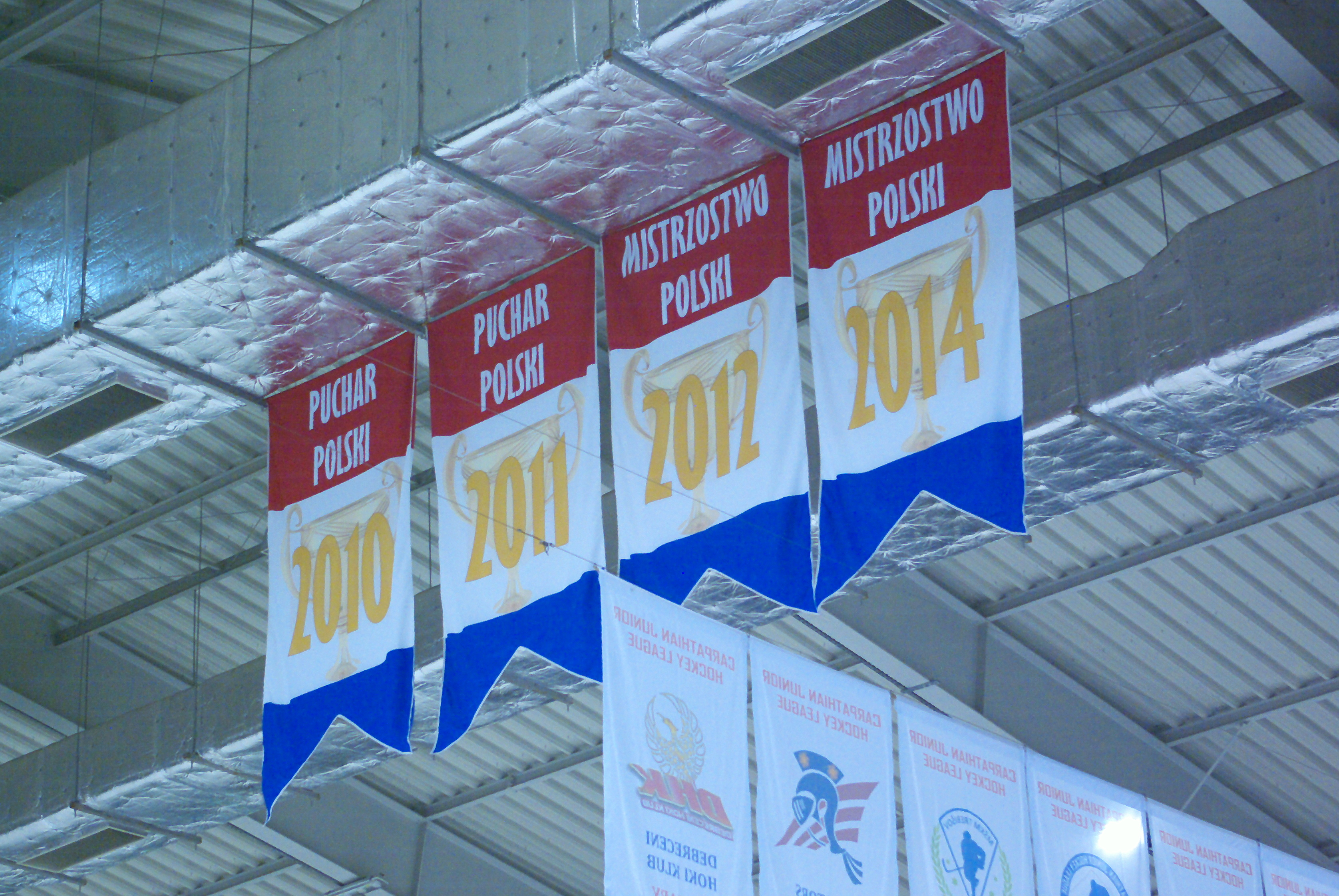 Mecz 2. ligi słowackiej w hokeju na lodzie Ciarko KH 58 Sanok - HKM Rimavská Sobota 4:2 (3 listopada 2018). Banery z trofeami klubu z Sanoka w hali Arena Sanok.